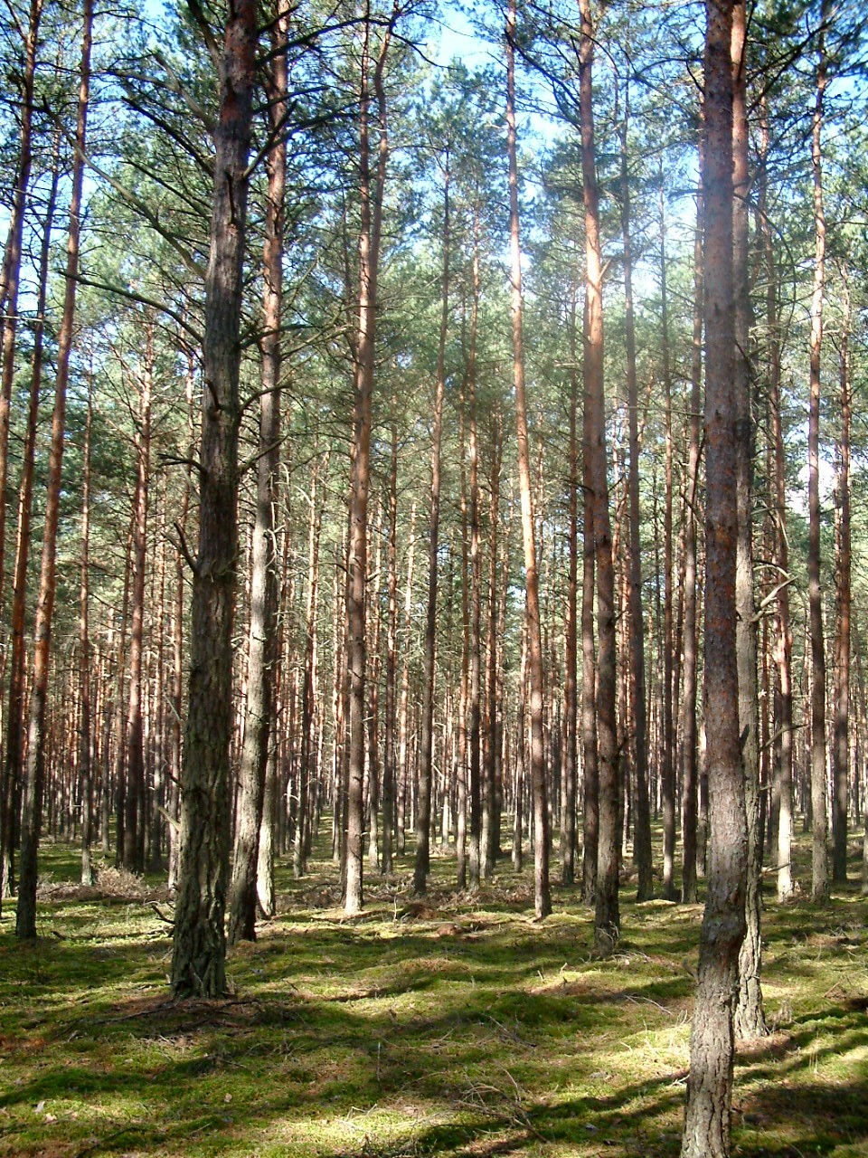 Monocultural pine forest - Puszcza Notecka near MiałyMonokulturowy bór sosnowy - Puszcza Notecka koło Miał